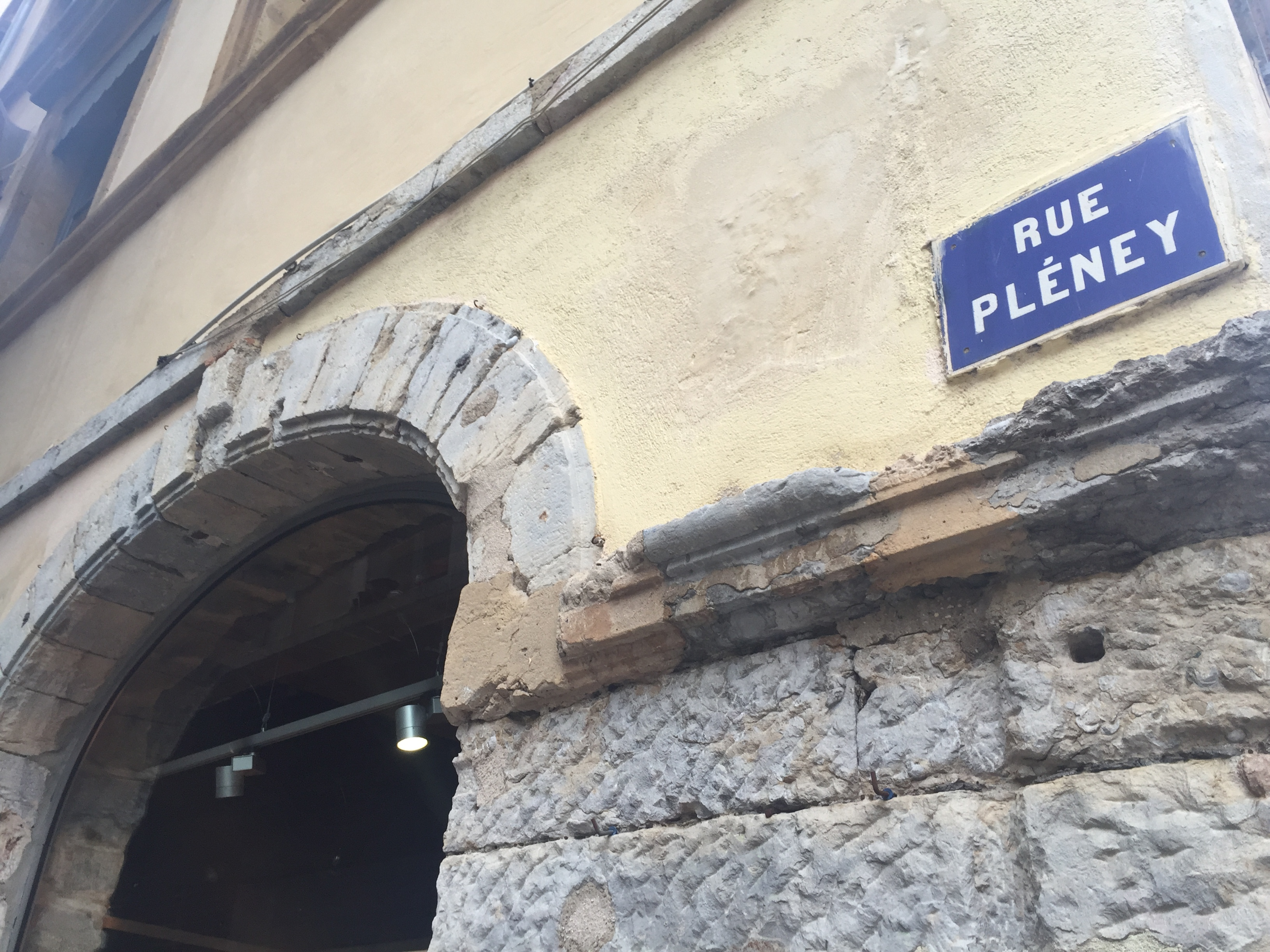 Image de Lyon en mars 2016.